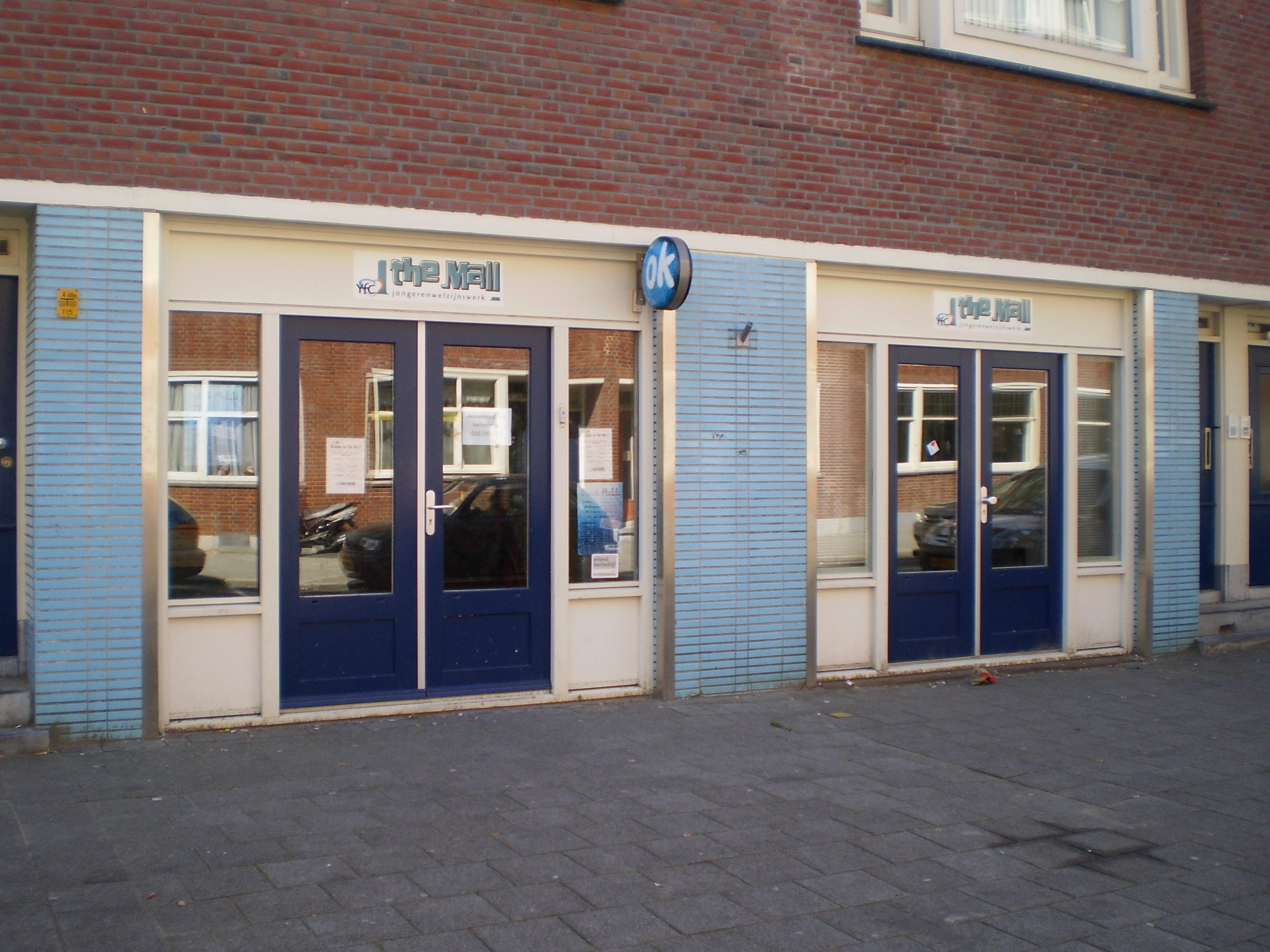 The Mall Millinx, jongerencentrum van Youth for Christ Rotterdam